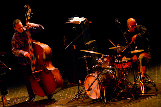 Sean Smith & Leon Parker avec le Jacky Terrasson Trio 11/05/2007